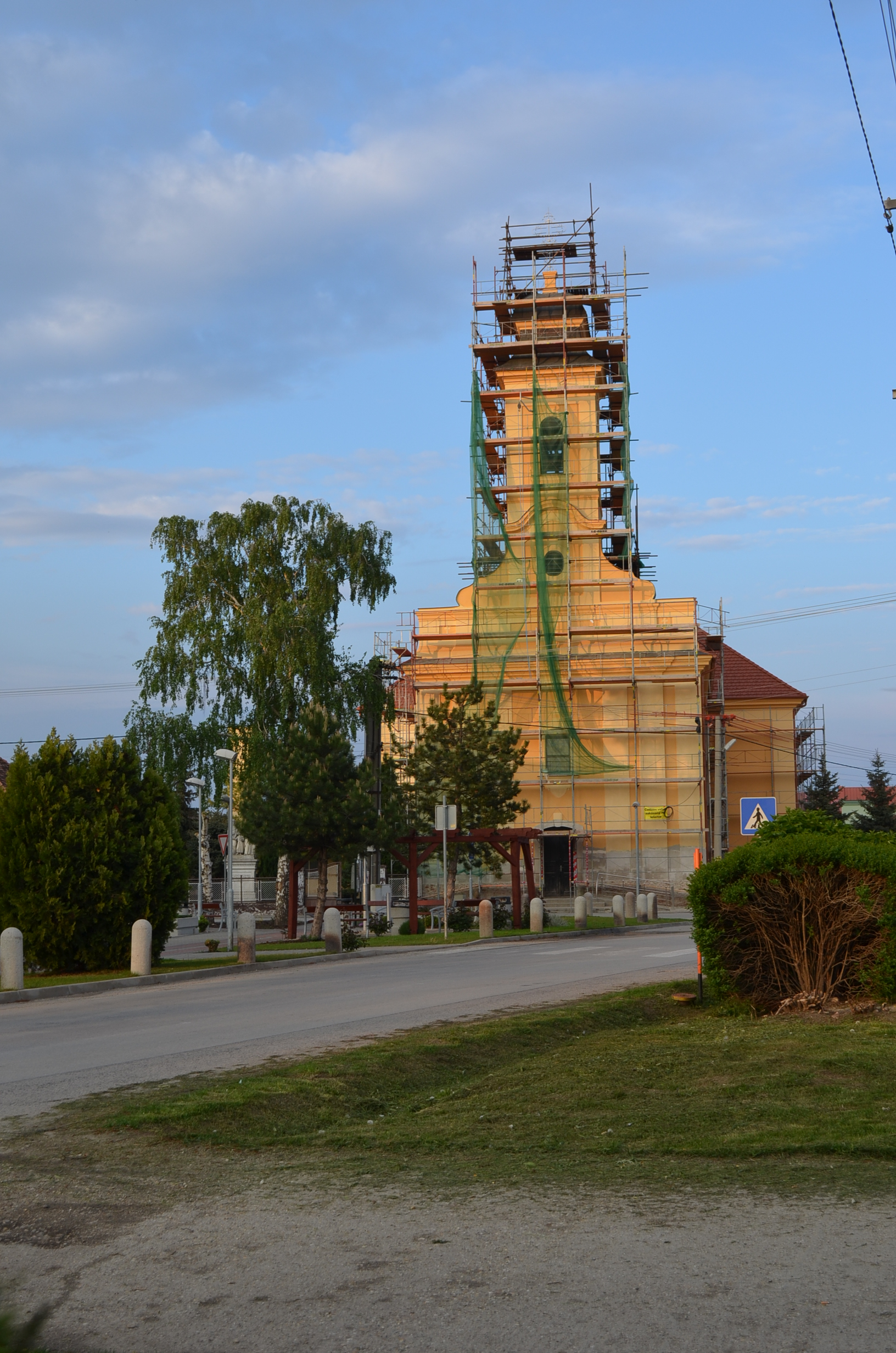 Nagymácséd